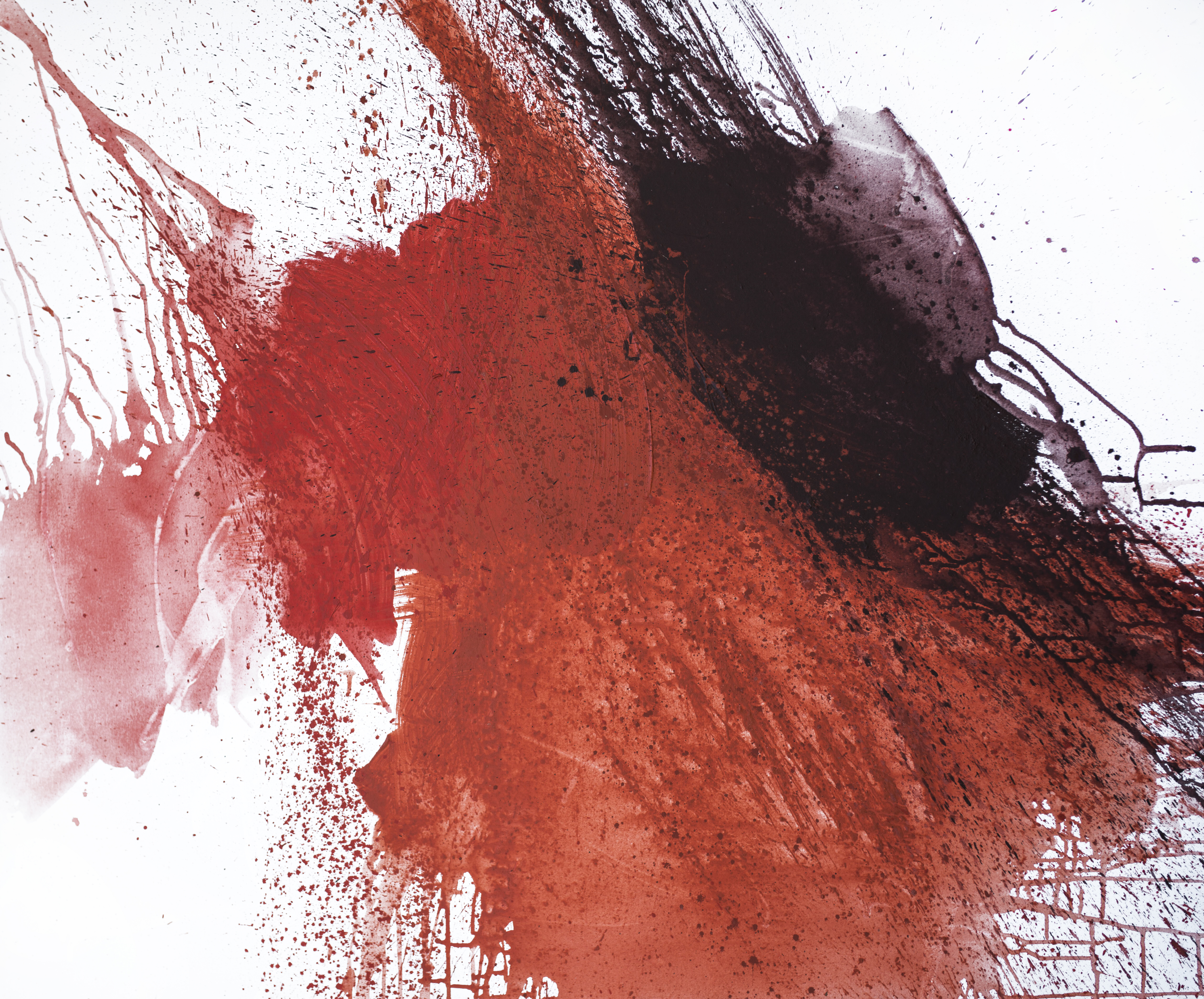 Srpskohrvatski / српскохрватски: Plamen - Akril na platnu 120x140cm - Natalija Miladinović 2017.